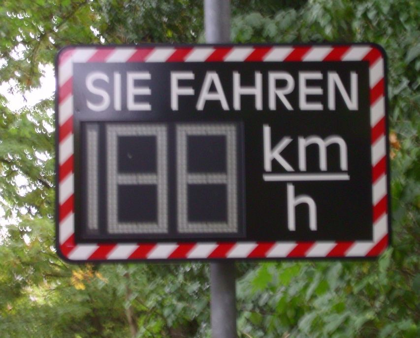 Geschwindigkeitsanzeigeanlage (aus)